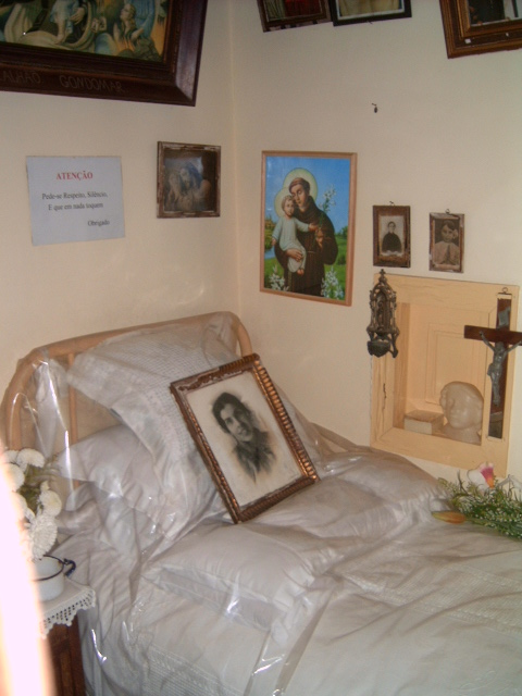 Room of Alexandrina Maria da Costa, Balazar, Portugal Photo by Manuel Anastácio